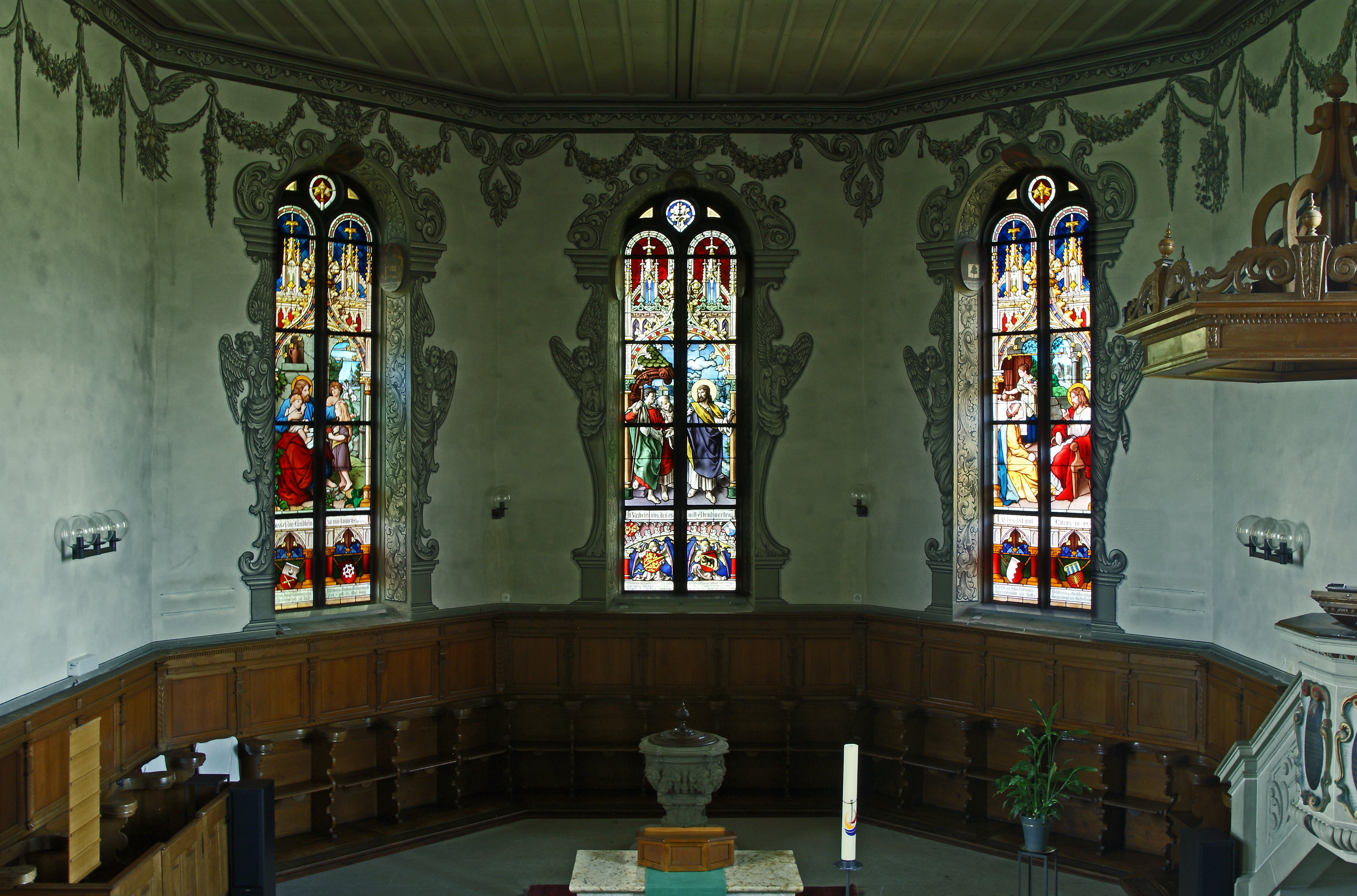 Reformierte Kirche Bätterkinden Kt. Bern, Chorfenster